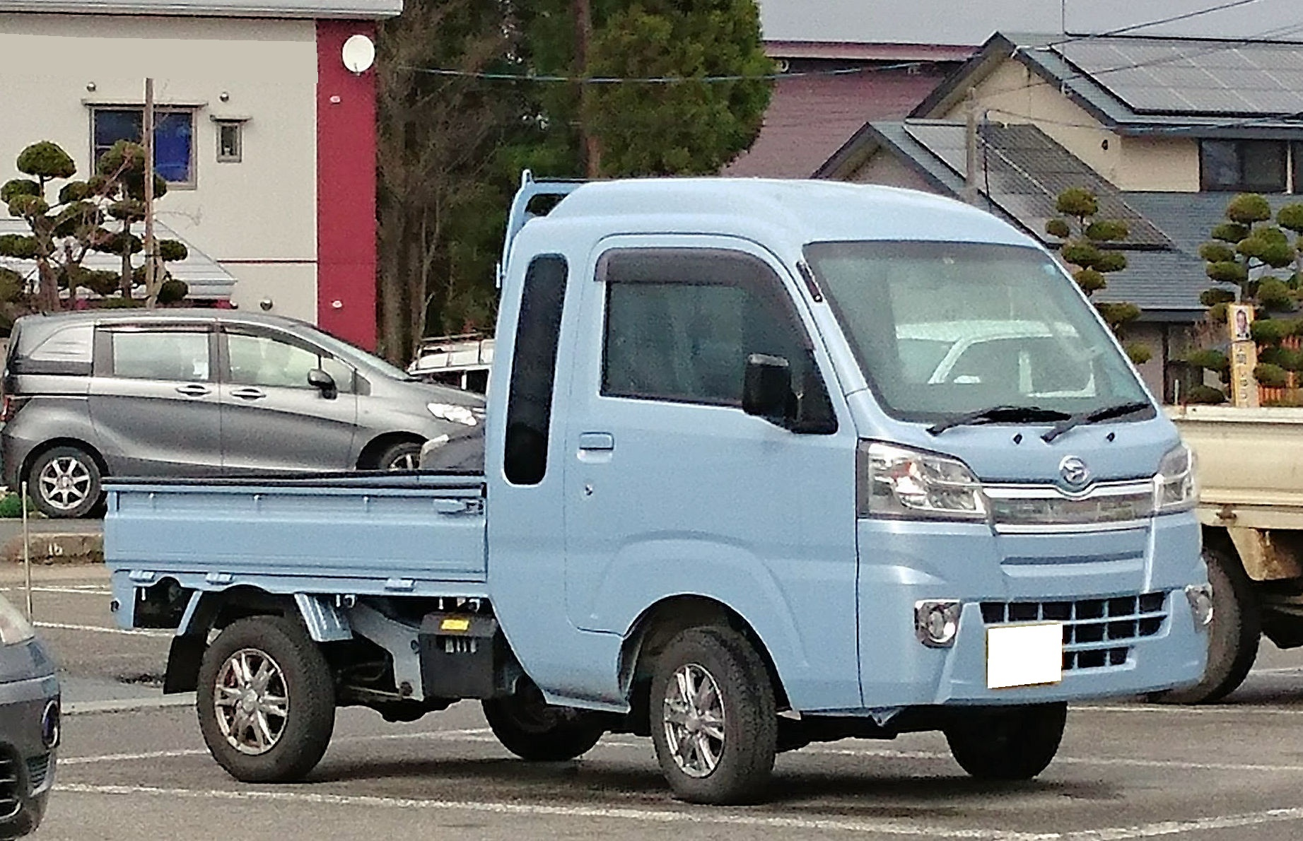 ダイハツ ハイゼット ジャンボ 選べるカラーパック装着車